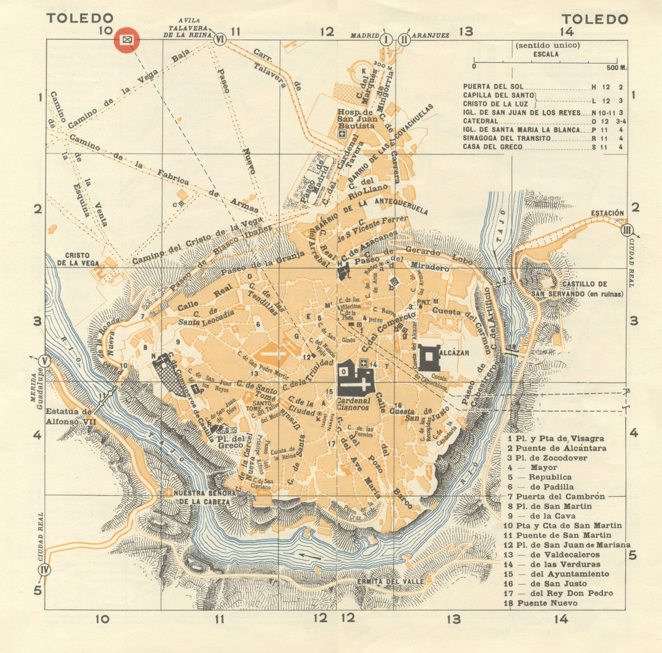 Plano de la ciudad de Toledo (España) (1936)